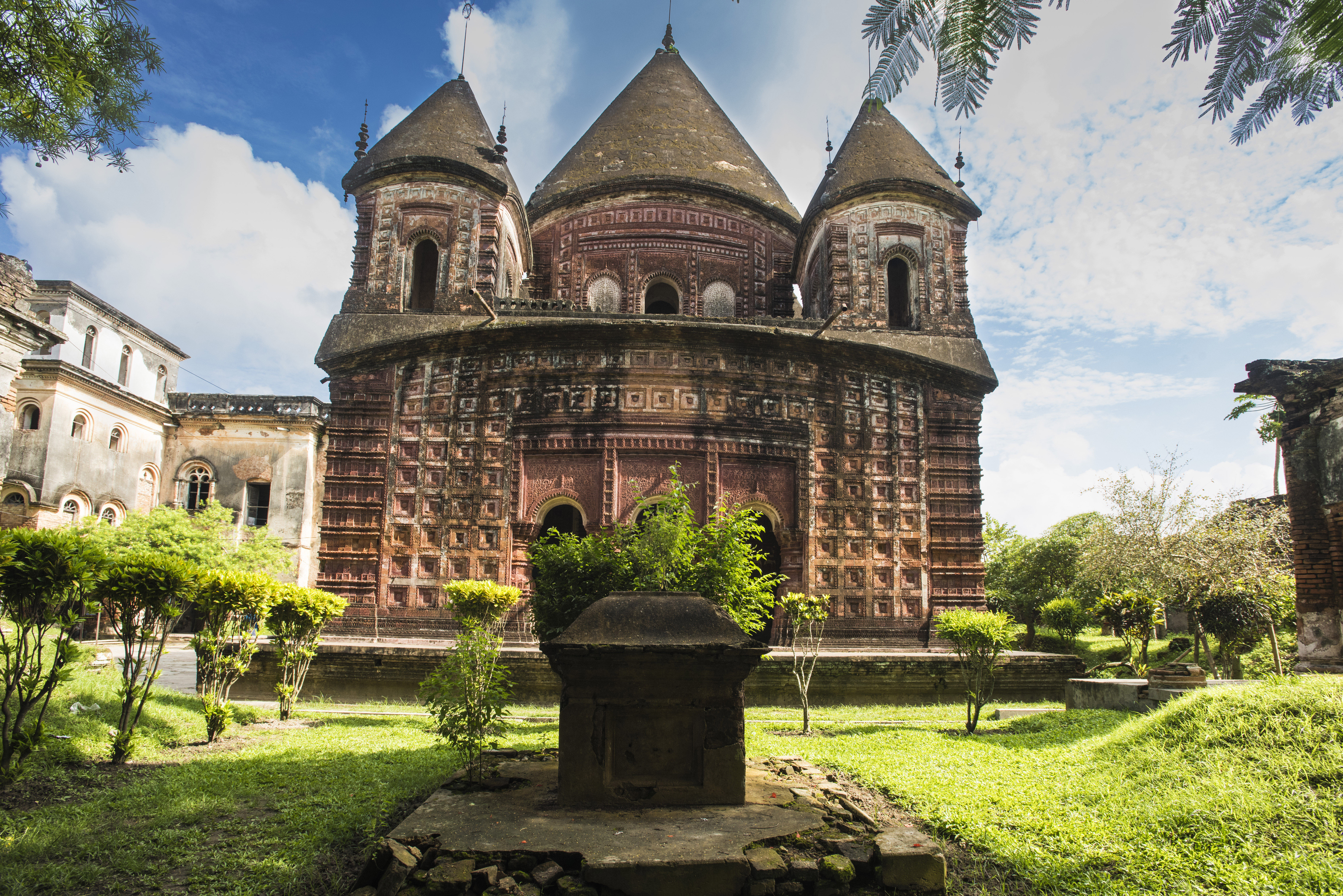 পঞ্চরত্ন গোবিন্দ মন্দির